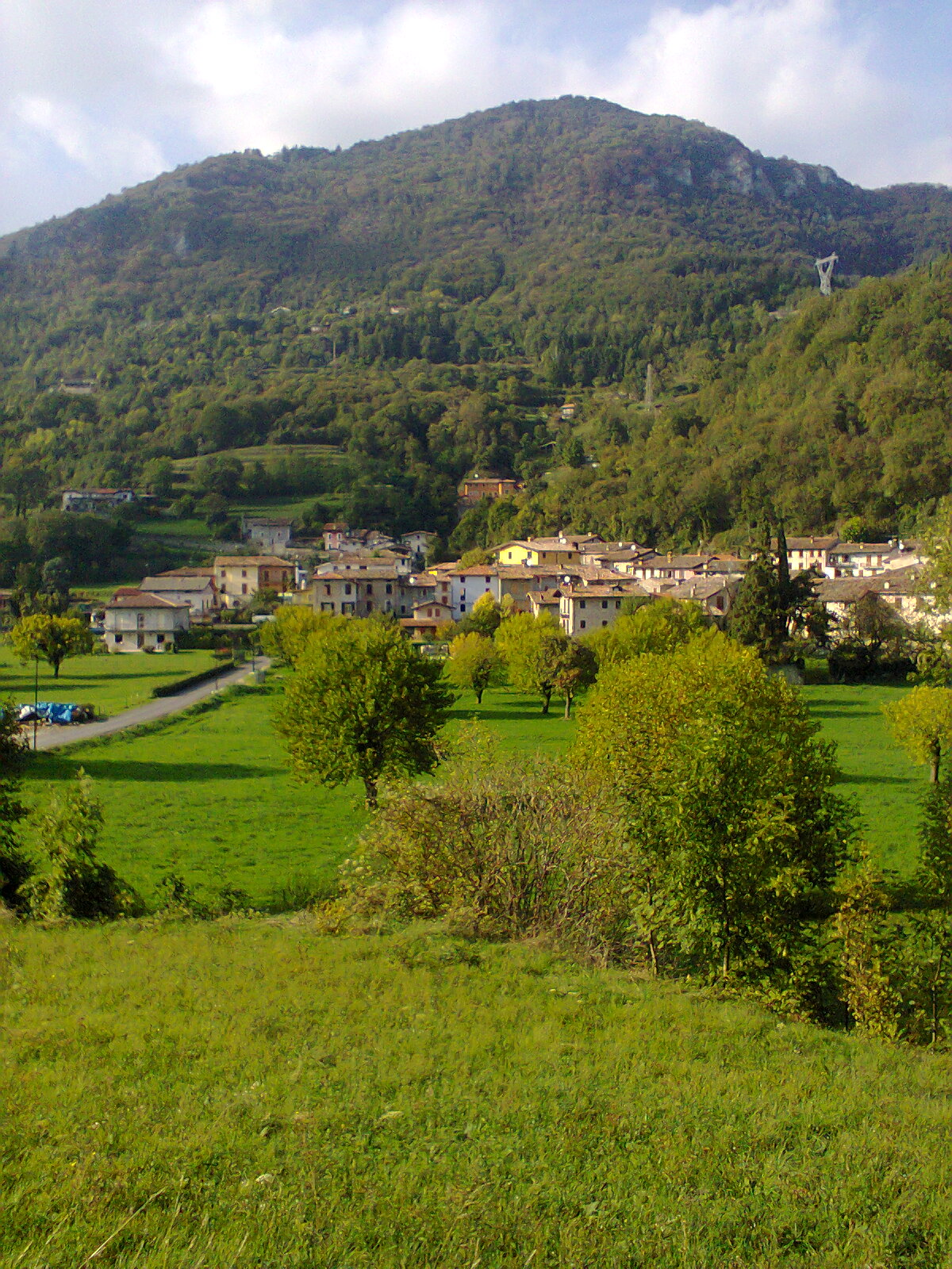 Navazzo di Gargnano